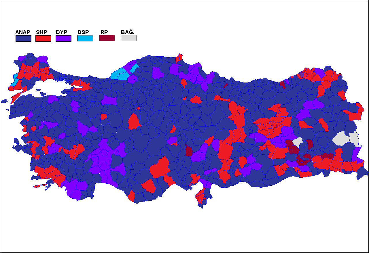 1987 genel seçimleri sonuçlarının Türkiye ilçeler haritasında gösterimi.